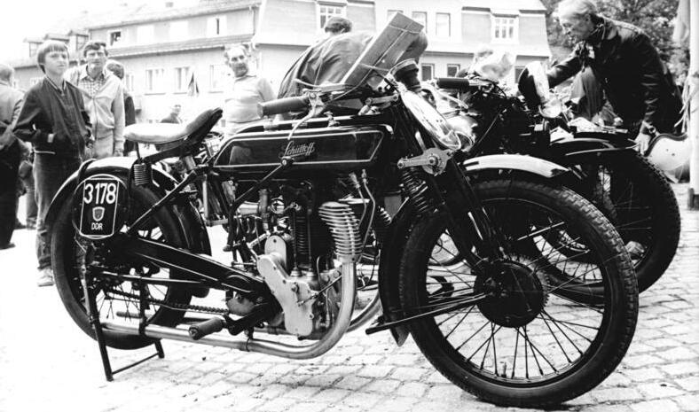 Münchenbernsdorf, Oldtimer, Schüttoff Motorrad ADN-ZB Kasper 27.8.85 Bez. Gera: Ältestes Zweiradfahrzeug des Veteranentreffens im Juni 1985 in Münchenbernsdorf war diese 350 cm³ Schüttoff aus dem Jahre 1924.